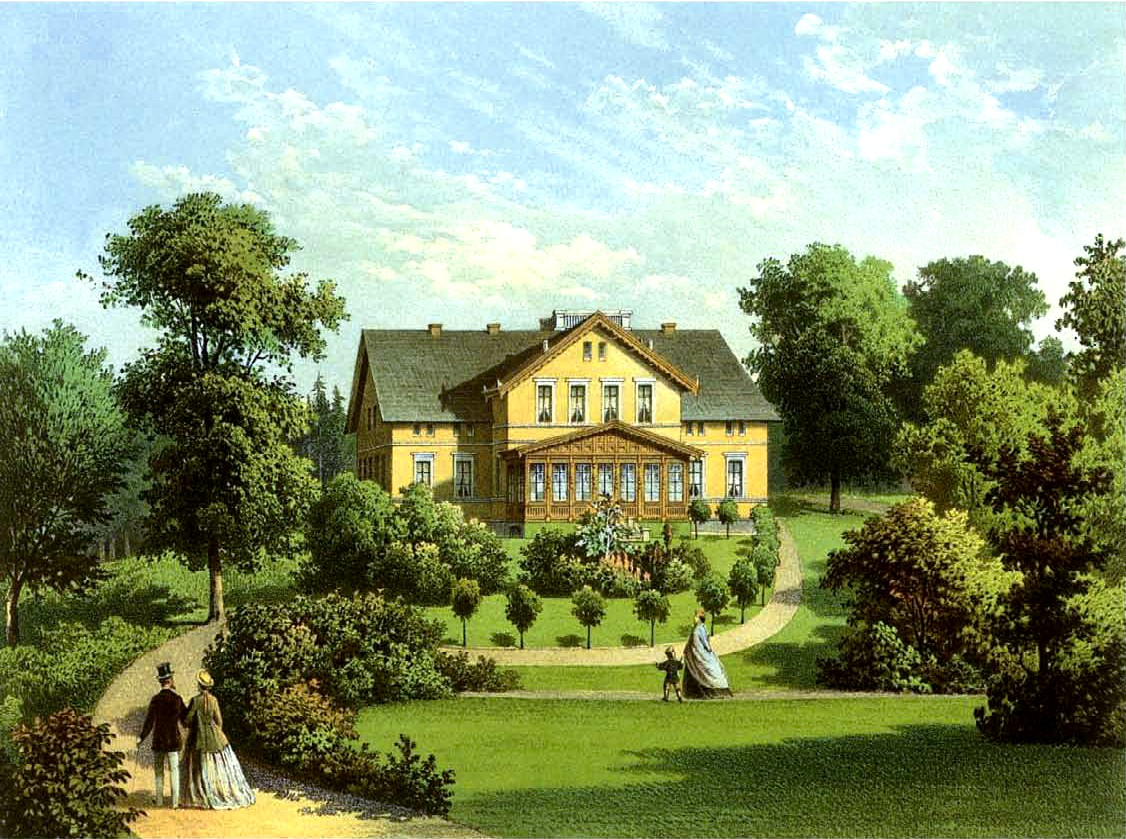 Rittergut Draulitten, Kreis Preußisch Holland in Ostpreußen um 1860